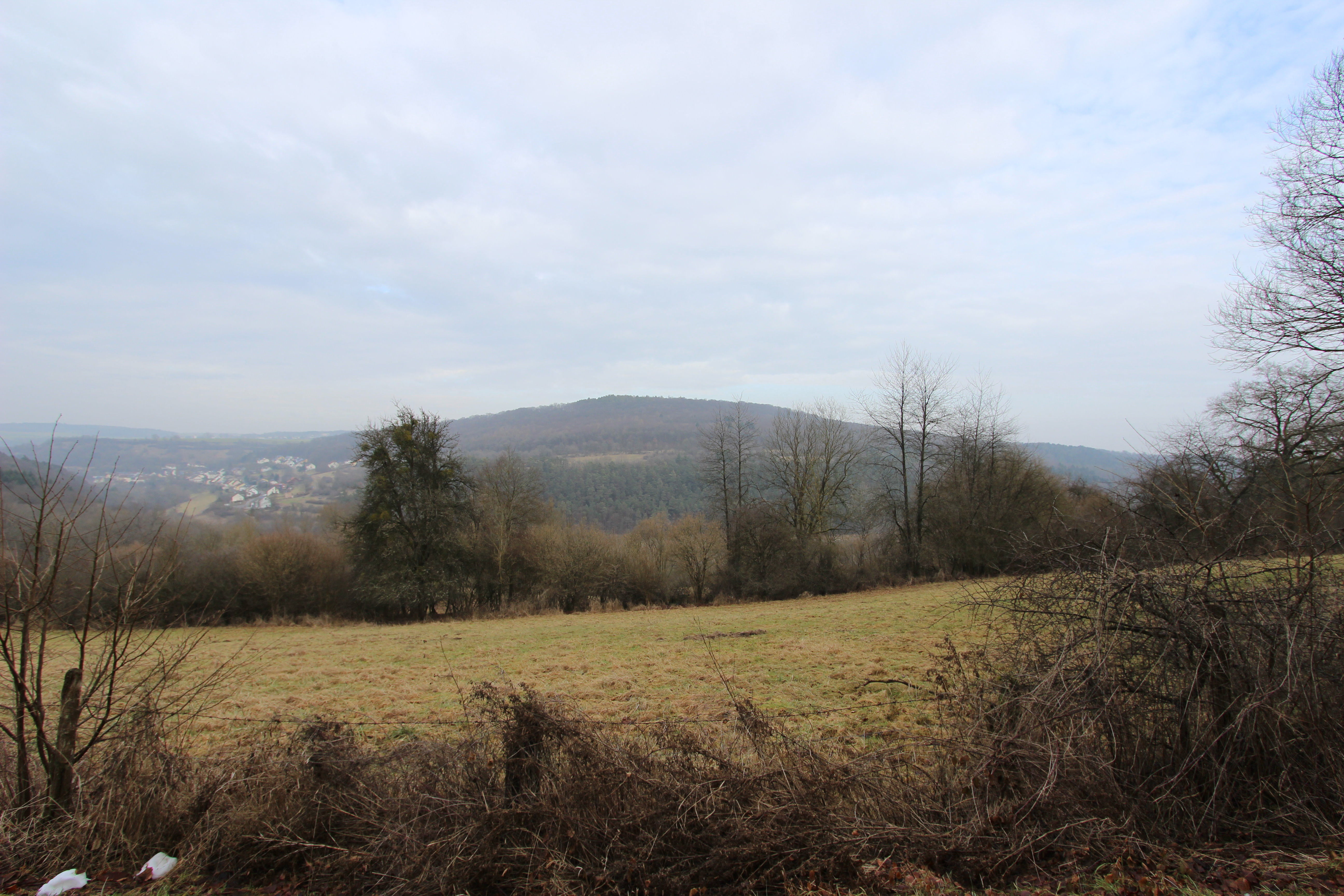 Naturschutzgebiet „Streuobstwiesen und Hecken am Münchensberg bei Hüttingen“ – 54636 Hüttingen a. d. Kyll; Kreisstraße 33 Richtung Röhl. Artenreiches Grünland mittlerer Standorte, Streuobst und Hecken charakterisieren den oberen Bereich des Südwesthanges nahe Hüttingen an der Kyll. Im Mai wächst eine großflächige Salbei Glatthaferwiese mit Orchis purpurea heran. Aufnahme von 2017.